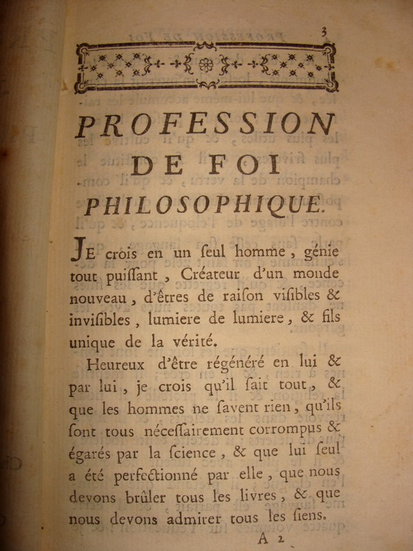 Première page de la "Profession de foi philosophique" de Charles Bordes, longtemps attribuée à Voltaire.